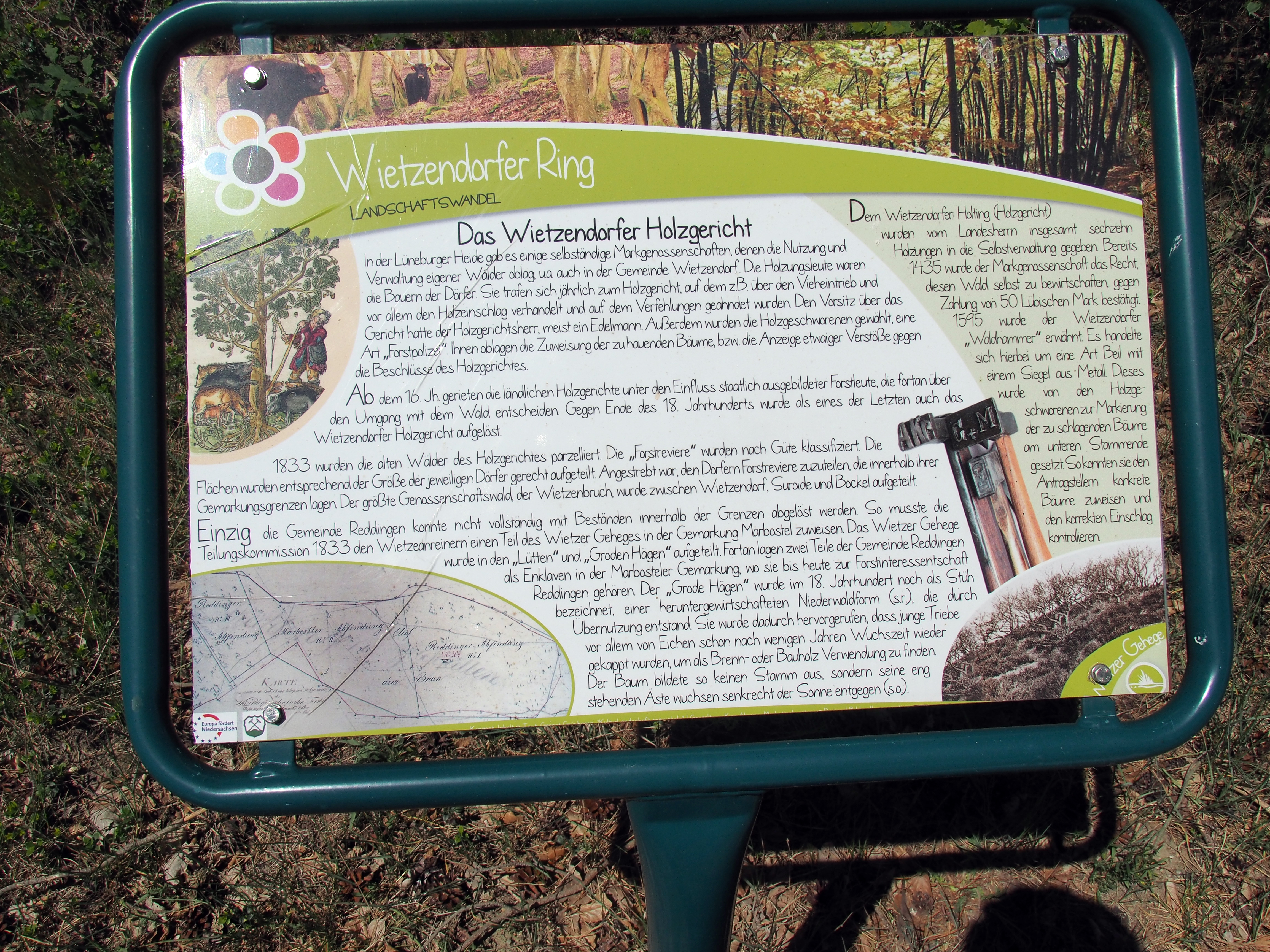 Infoschild zum „Wietzendorfer Holzgericht“